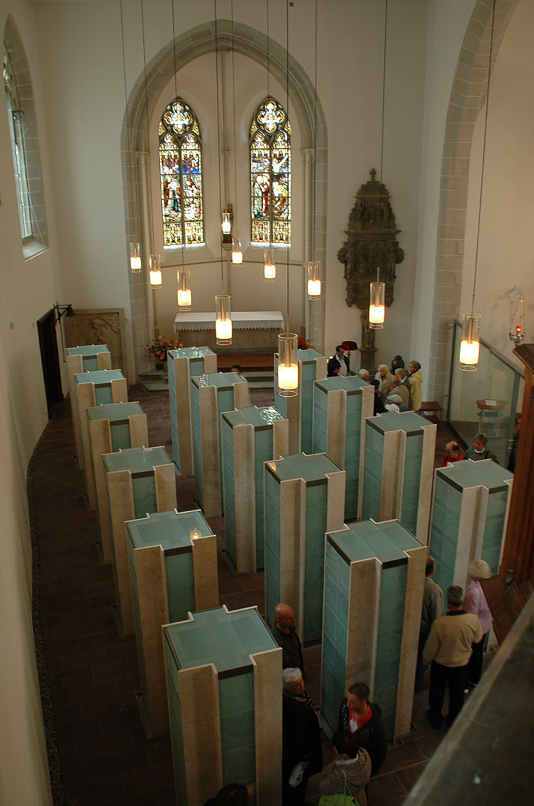 Nordschiff der Allerheiligenkirche an der Ecke Marktstraße/Allerheiligenstraße in Erfurt